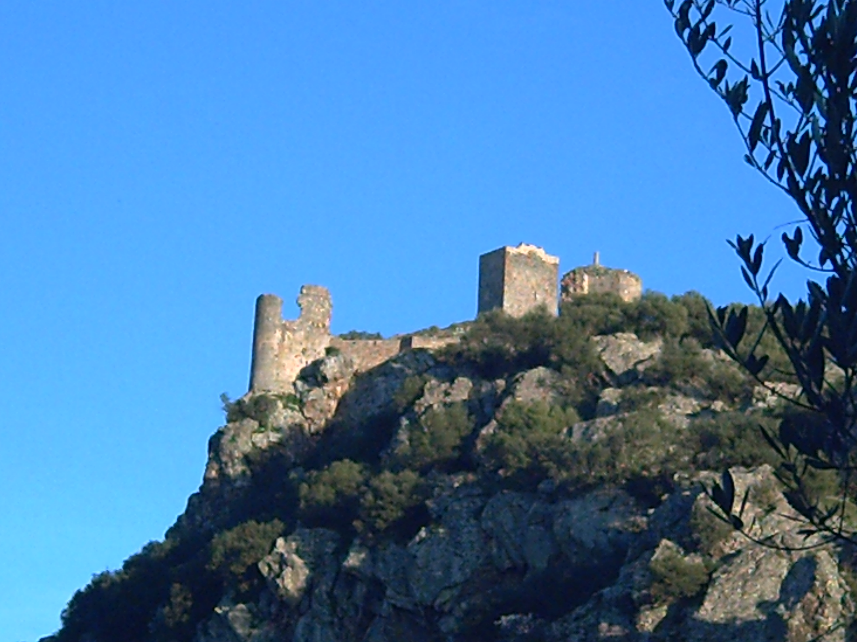 Castillu d'Alanhi